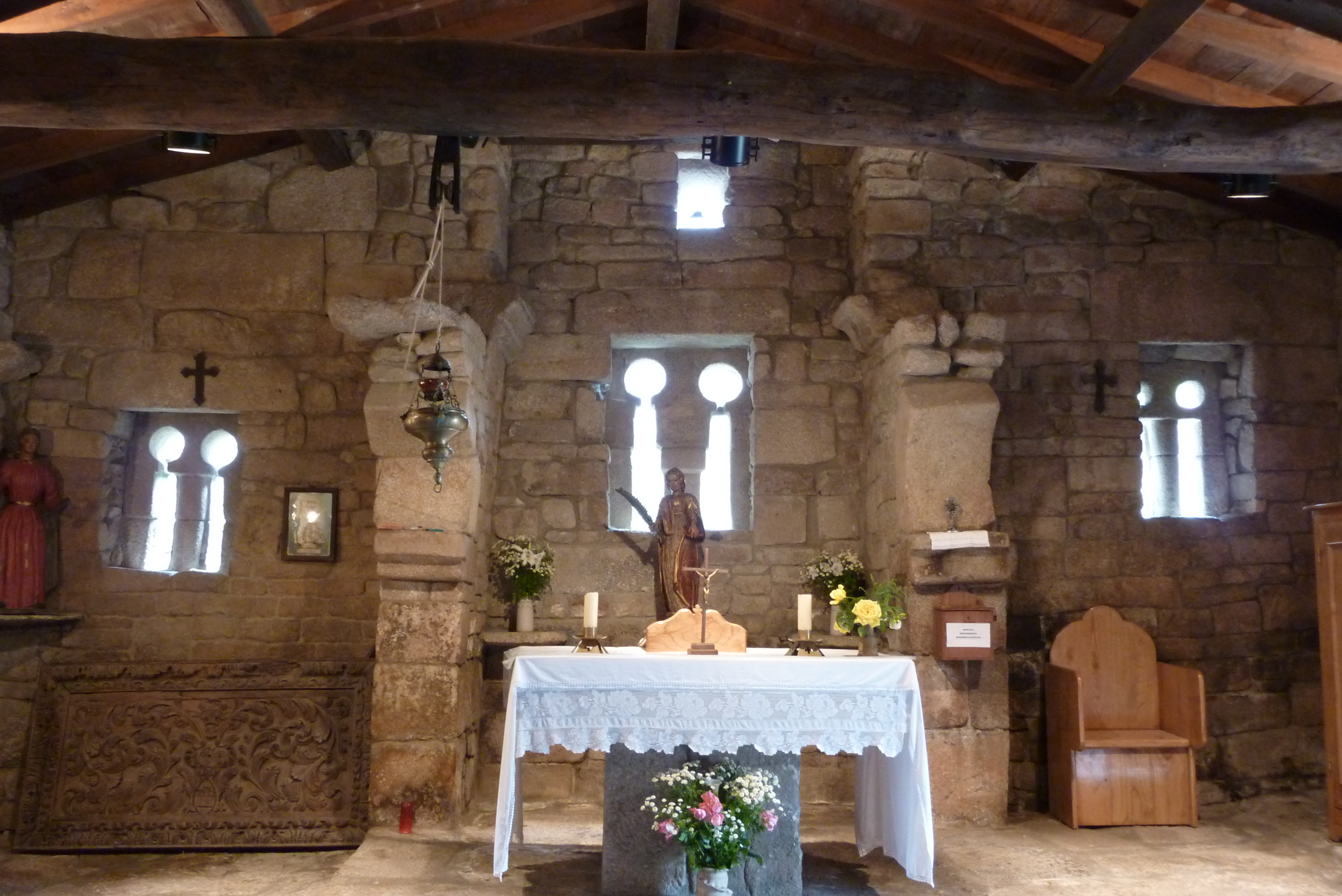 Santa Eufemia de Ambía, Innenansicht Schlüssellochfenster